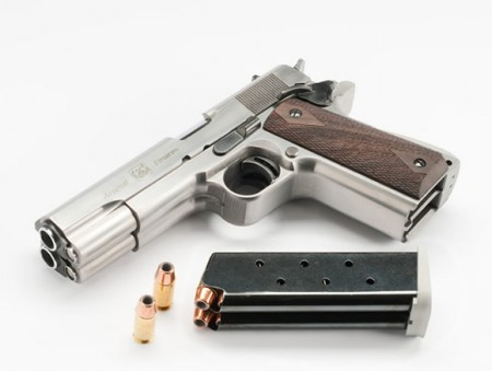 AF-2011 A1